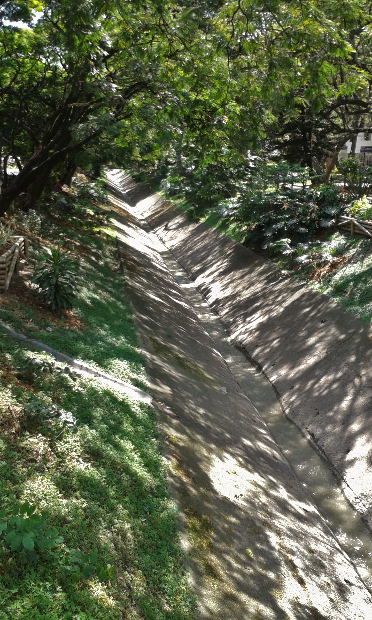 Quebrada La Picacha, Medellín